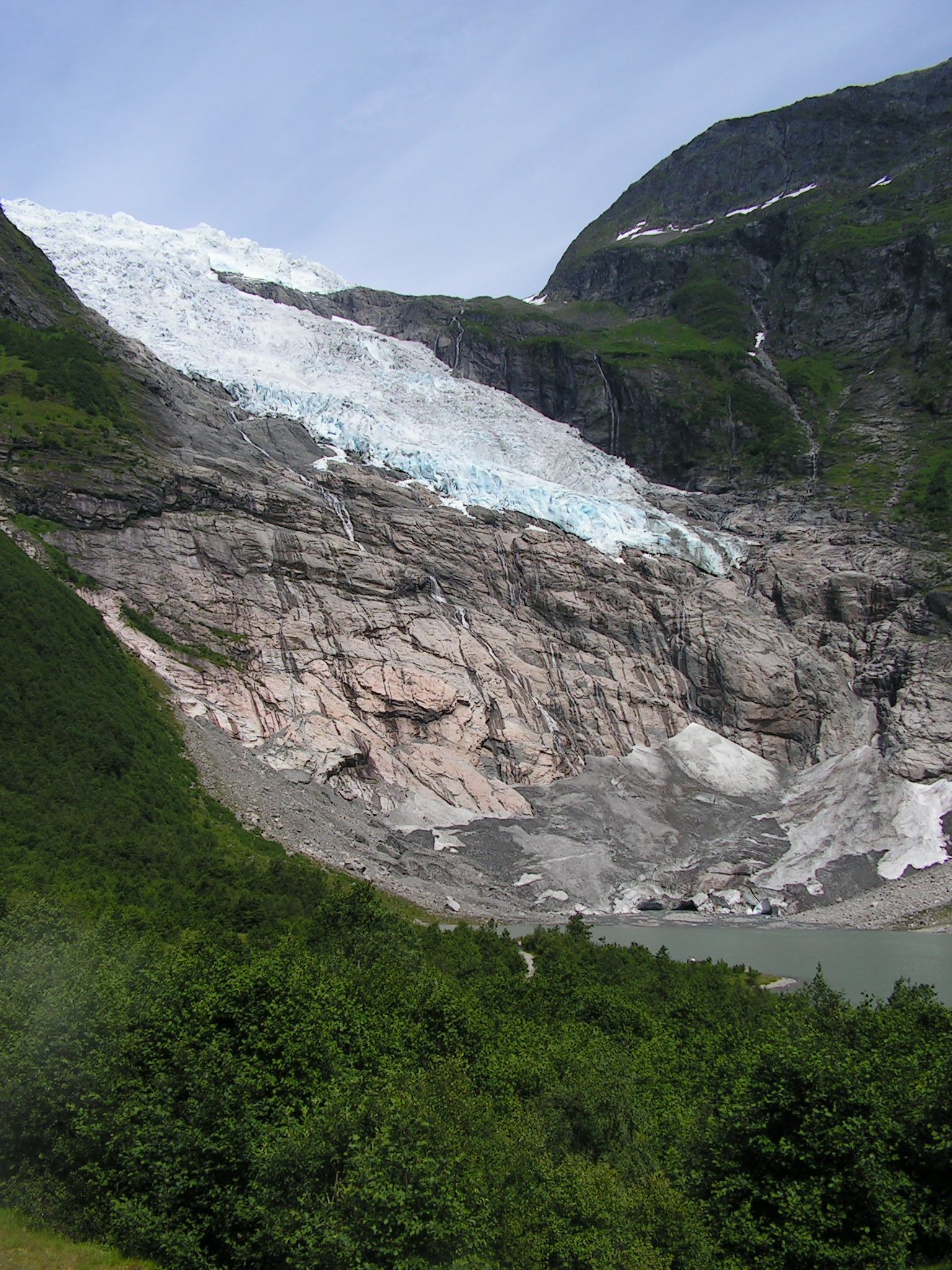 Beskrivelse Bøyabreen